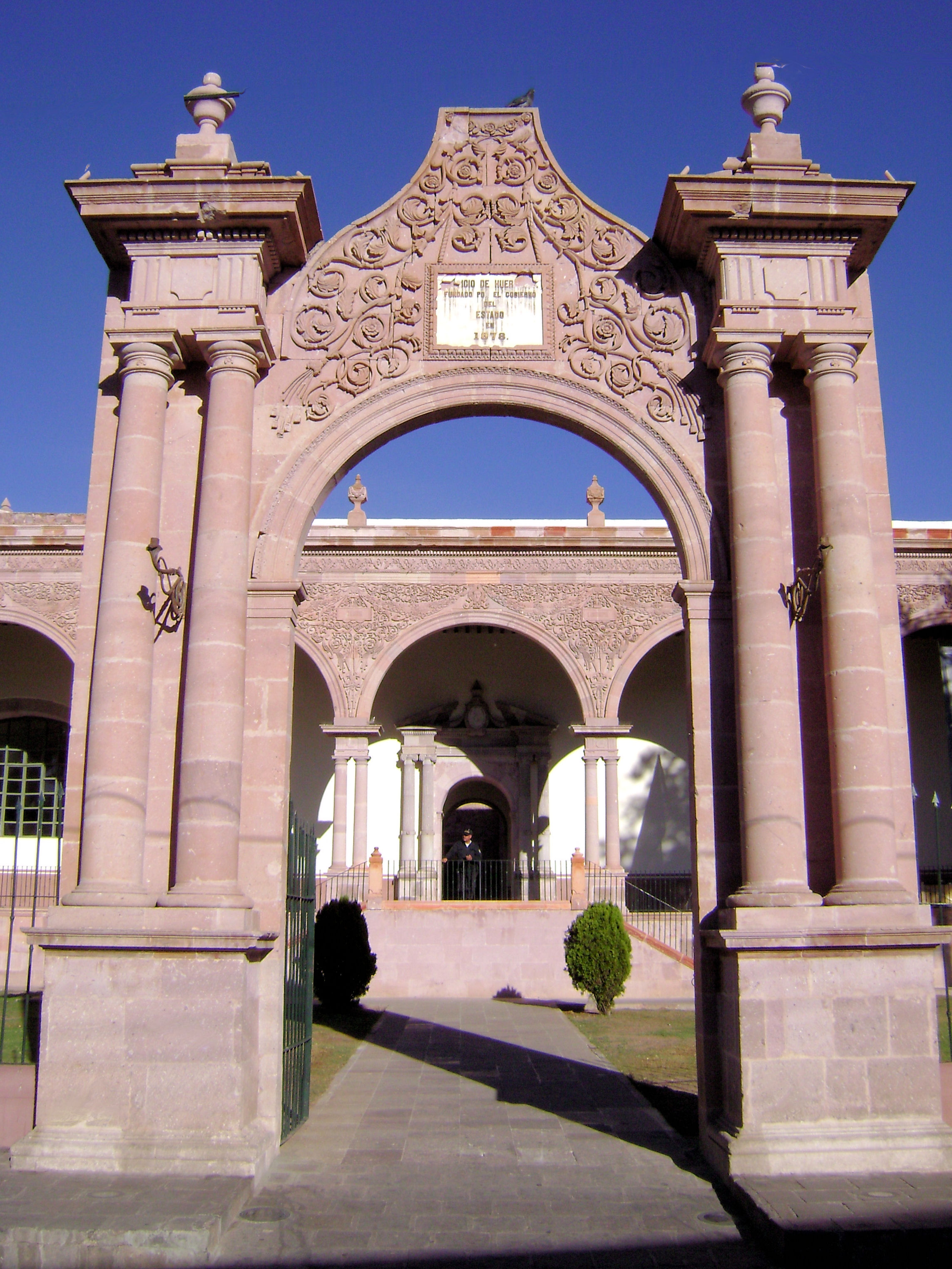 Portada del ex Hospicio de Niños, ahora Museo de Guadalupe.